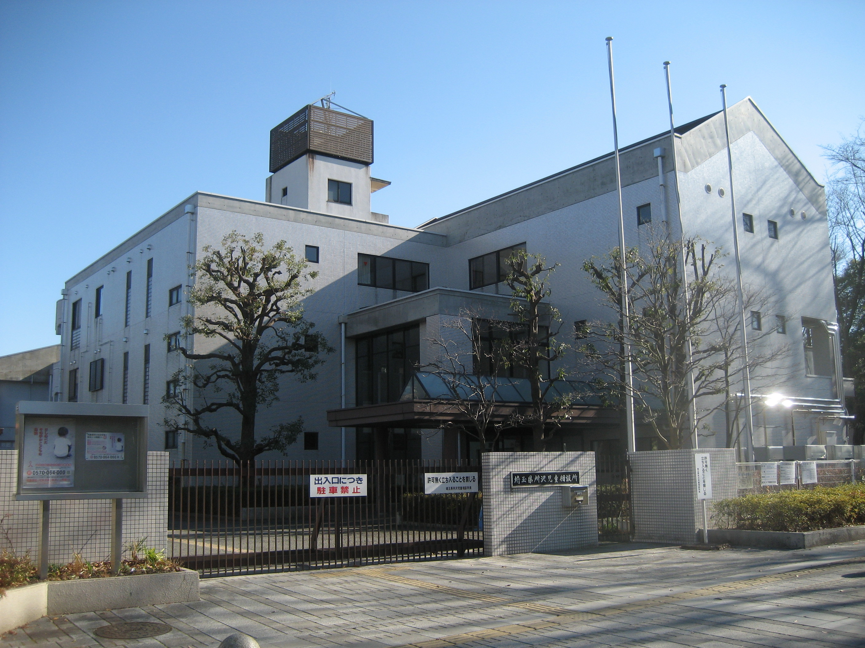 埼玉県所沢市に所在する埼玉県所沢児童相談所庁舎